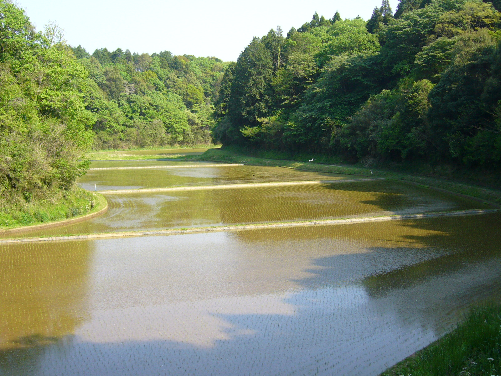 yatsuda,katori-city,japan